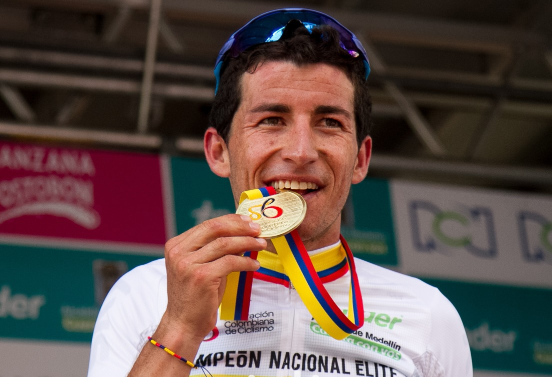 Sergio Luis Henao - Campeón élite de ciclismo en ruta de Colombia 2018